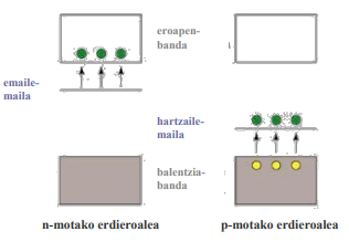 N eta p motako erdieroaleak